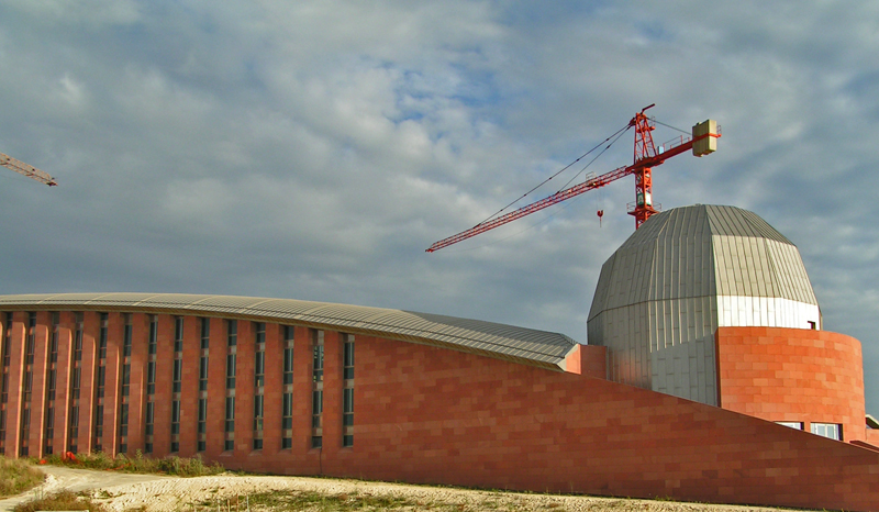 Orto Botanico dell'Università di Sassari, Sassari, Sardinia, Italy.